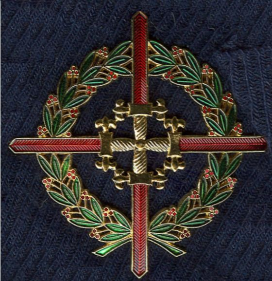 Scan van een kleinood uit mijn verzameling op een sok, dat scant fraai nietwaar?